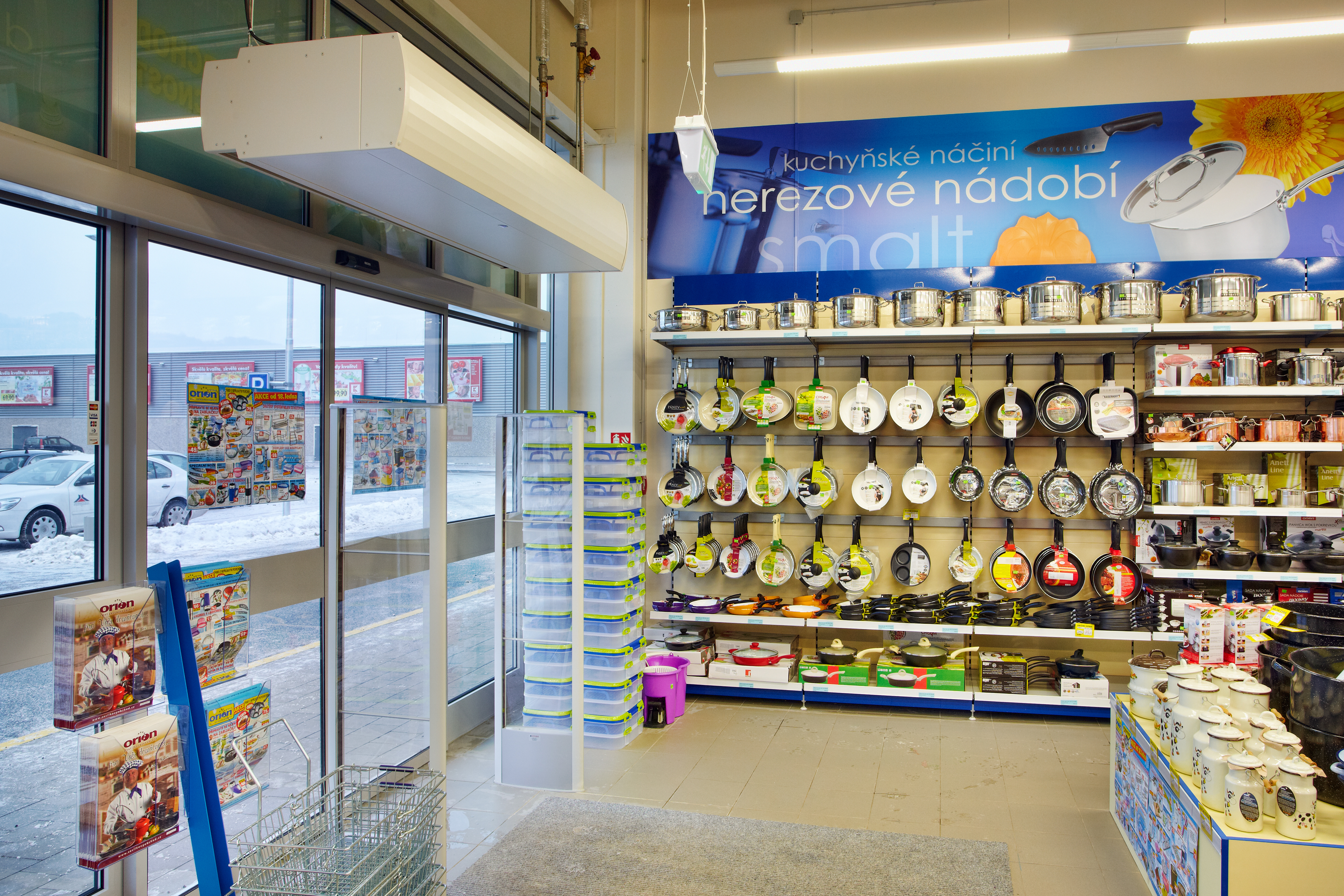 Русиньскый: Horizontal air curtain